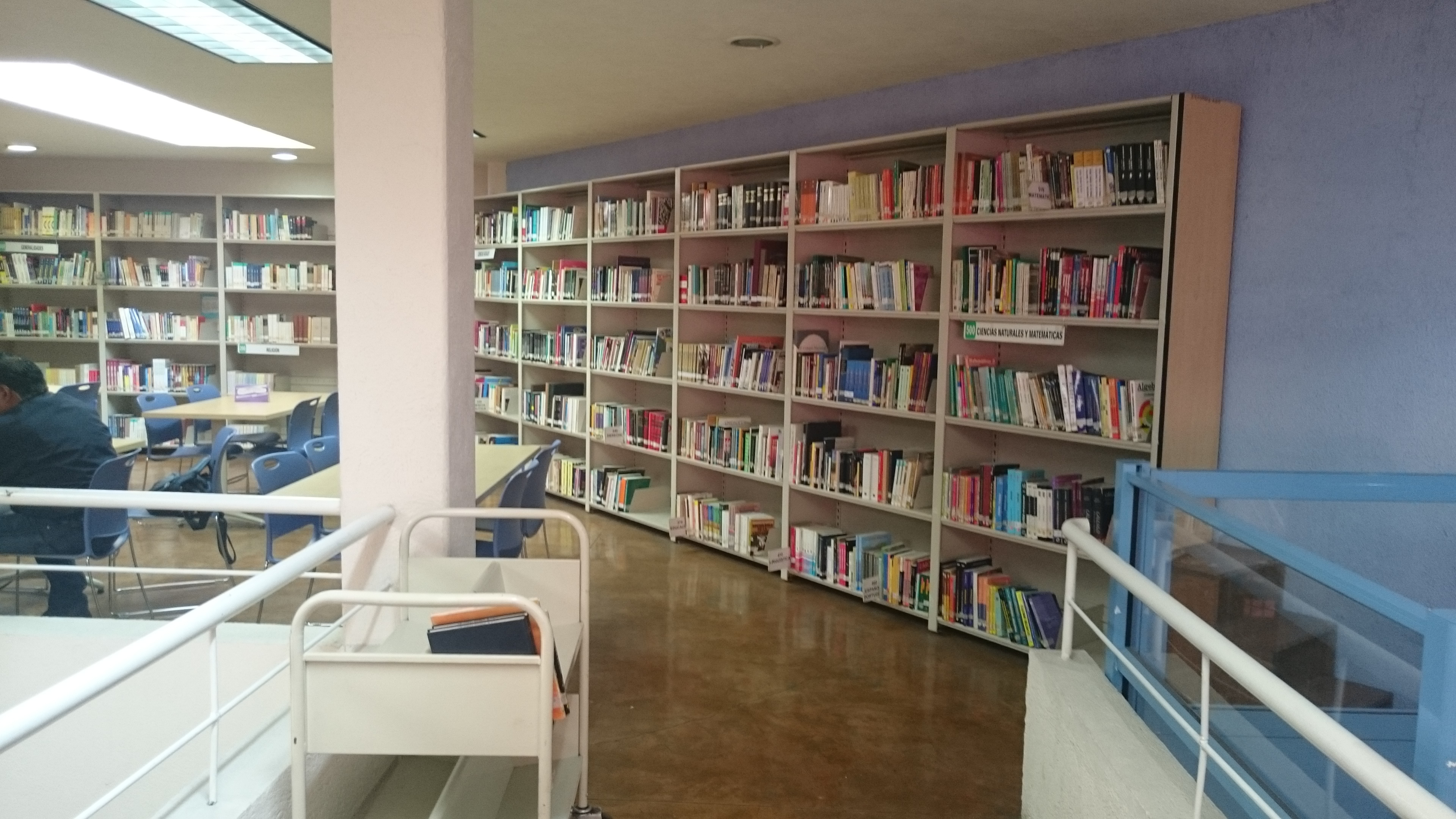 Se encuentra una diversa variedad de libros en la Biblioteca Central. Foto tomada en la Biblioteca Central, Ubicada en Tlalpan (Junto al Centro de Tlalpan)